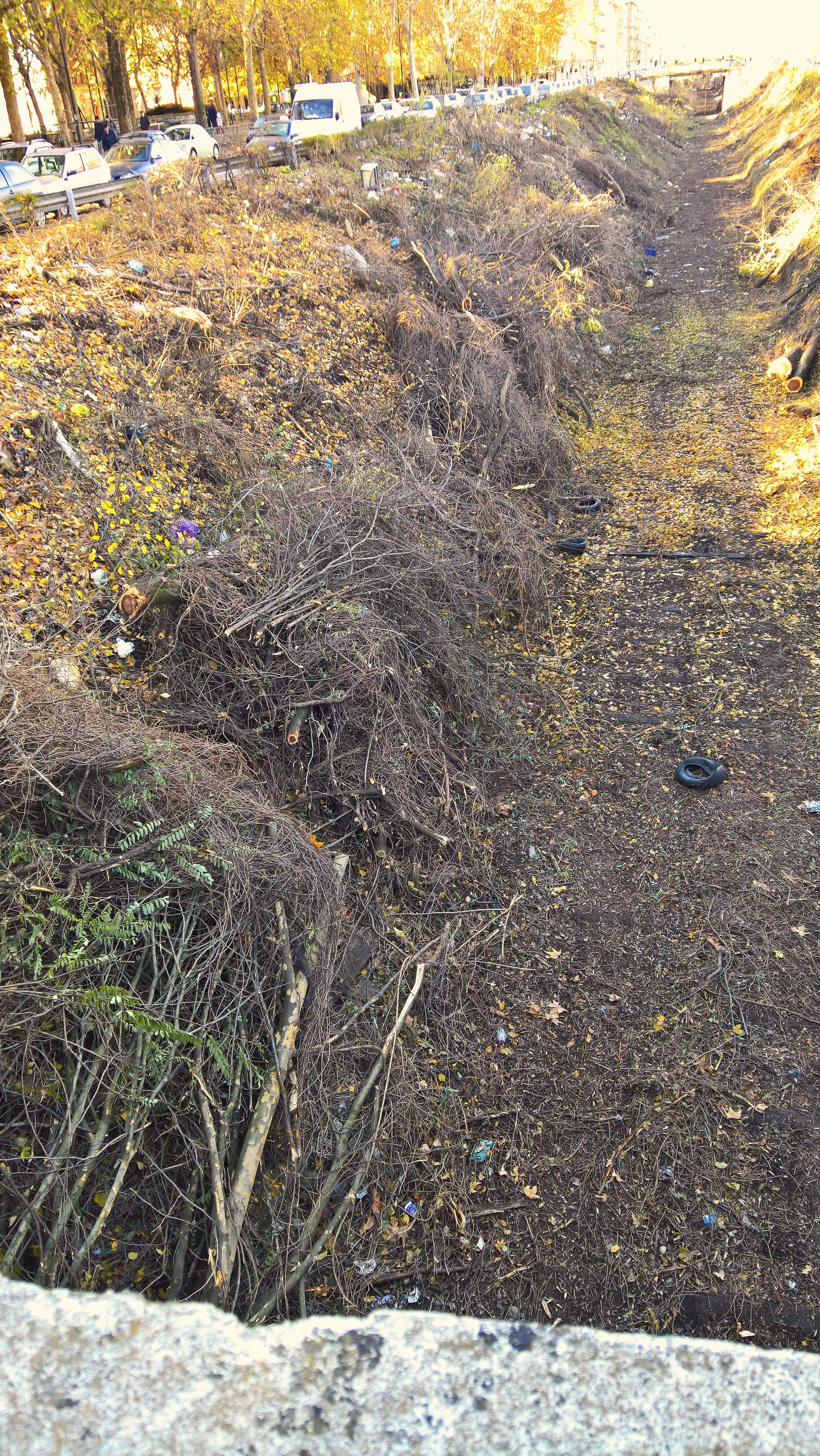 7/12/2018 - Paesaggio di desolazione ripreso dal medesimo ponte di via Mercadante